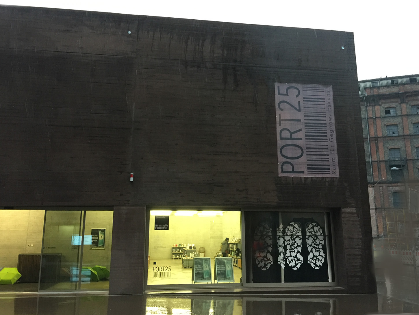 Port25 – Raum für Gegenwartskunst ist eine Galerie in Mannheim im Stadtviertel Jungbusch, die den Austausch zwischen Bildendenden Künstlern aus dem Raum Rhein-Neckar und internationalen Kunstschaffenden fördert